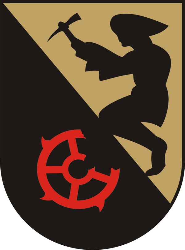 Das Wappen stellt zur Symbolisierung des Namensteiles „Hauenstein“ einen Bergknappen auf goldenem Grund, mit einem Bergeisen auf den Stein hauend, dar. Das gebrochene Richtrad verweist auf die Namensgebende Schutzpatronin „Hl. Katharina“ und ihre Hinrichtung durch das Rad.